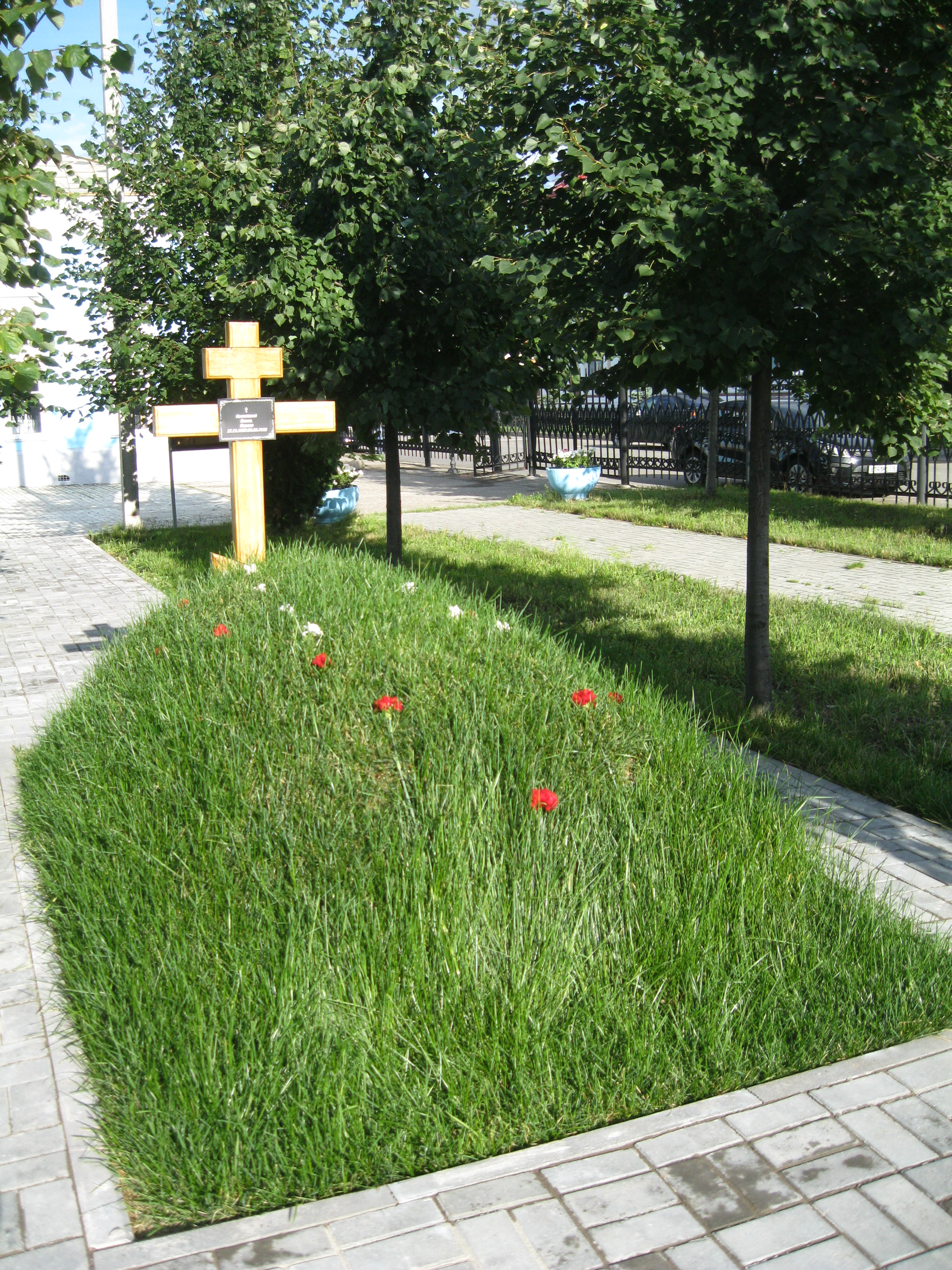 Могила благочинного кряшенских приходов Казанской епархии Павла Павловича Павлова (1957-2019), Казань, Татарстан, Россия